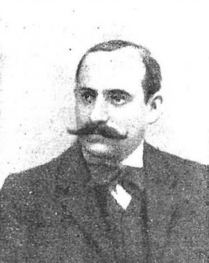 Pedro Corominas..